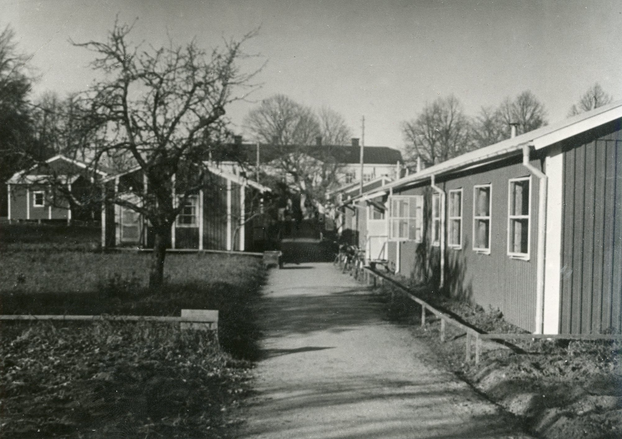 Norsk mottagercentral på Kjesäter. På Kjesäter slott i syd-Sverige har de norske myndigheter en mottagercentral for flyktninger fra Norge. Her registreres og legeundersøkes alle flyktninger før de reiser videre, noen til de noske politiforlegninger, andre til skoler eller sivilt arbeide, familieforlegninger, kvinneforlegninger etc. Bildet viser en del av brakkeanlegget på Kjesäter. Sth. 1.2.45. RA/PA-1209/Uc/65/1-2/S 5499